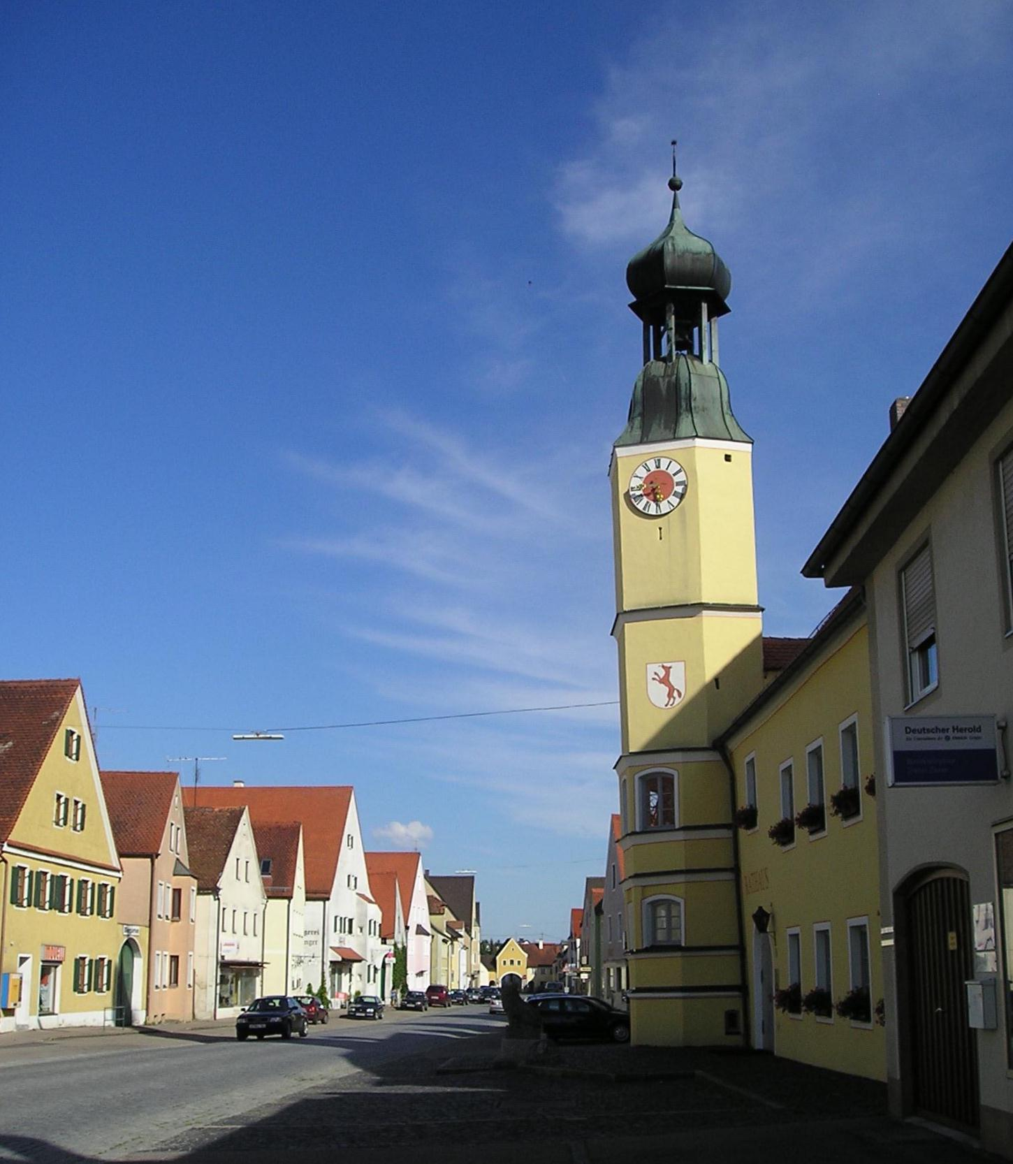 Rennertshofen mit Rathaus